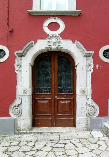 Un portale a Colle Sannita (BN)